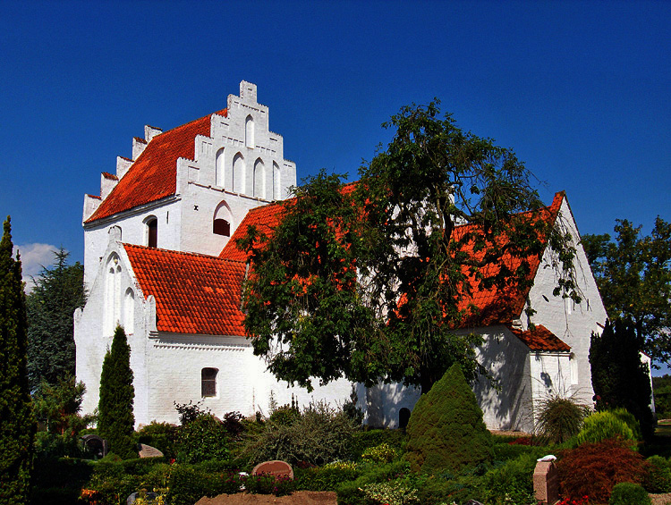 fra sydøst